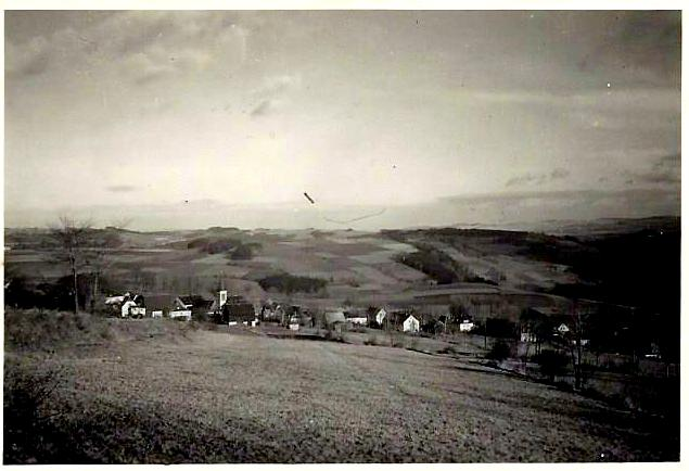 Blick von Alte Königswalder Straße auf die abschüssige Alte Dorfstraße, Bereich um die evangelische Kirche, 1943.